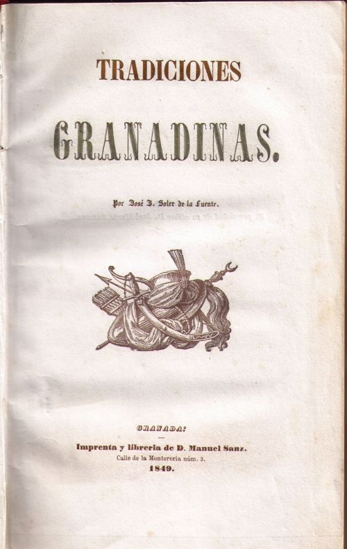 1ª página de Tradiciones Granadinas, de José Joaquín Soler de la Fuente